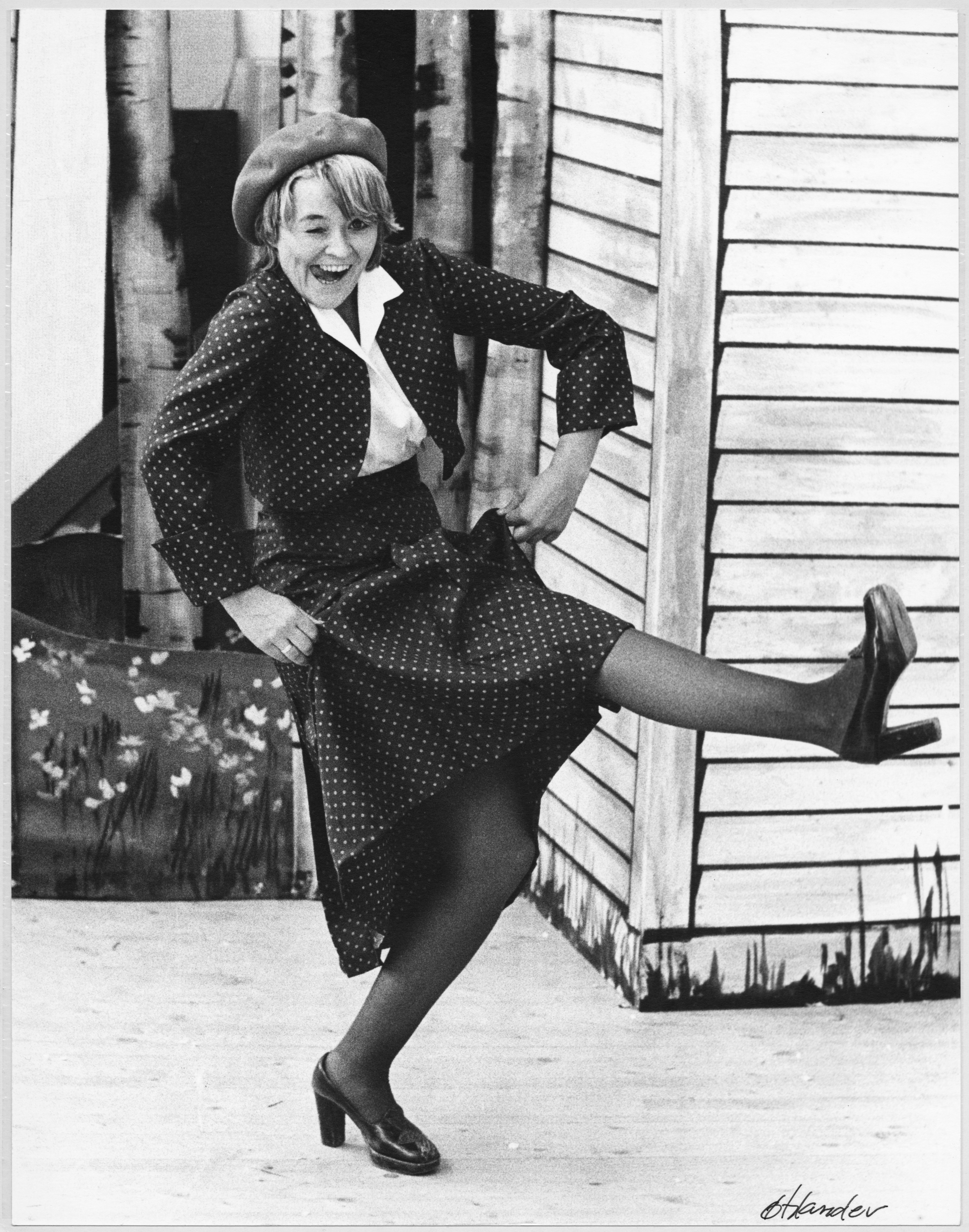 Kirsti Sparboe som Gunvor Smikkstugun i Trøndelag teaters oppsetning av musikalen Trost i taklampa. Tekst: Alf Prøysen og Asbjørn Toms. Musikk: Finn Ludt. Premieredato 9. mai 1975